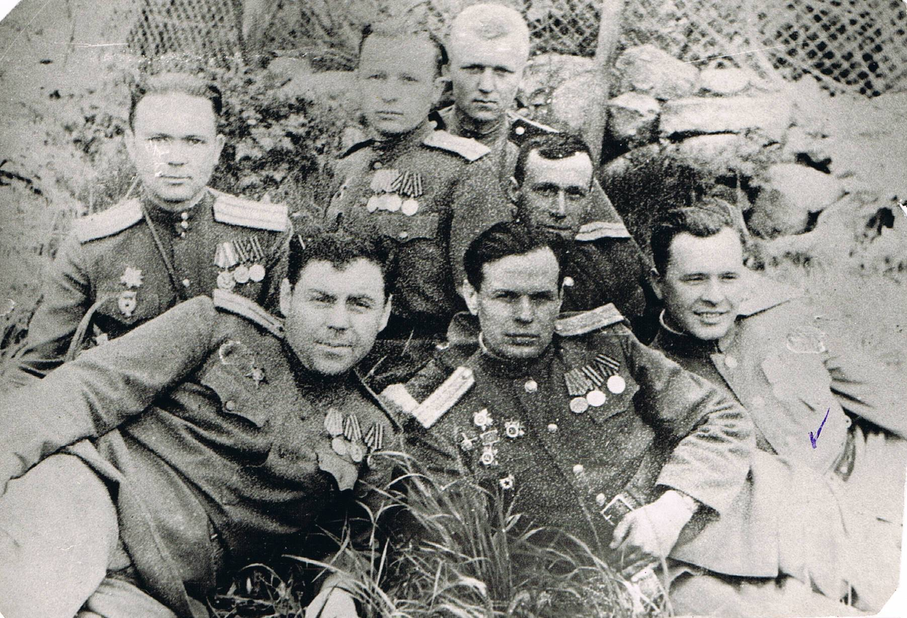 8-й гв. ск. Весна 1945. Офицеры управления корпуса после боя.